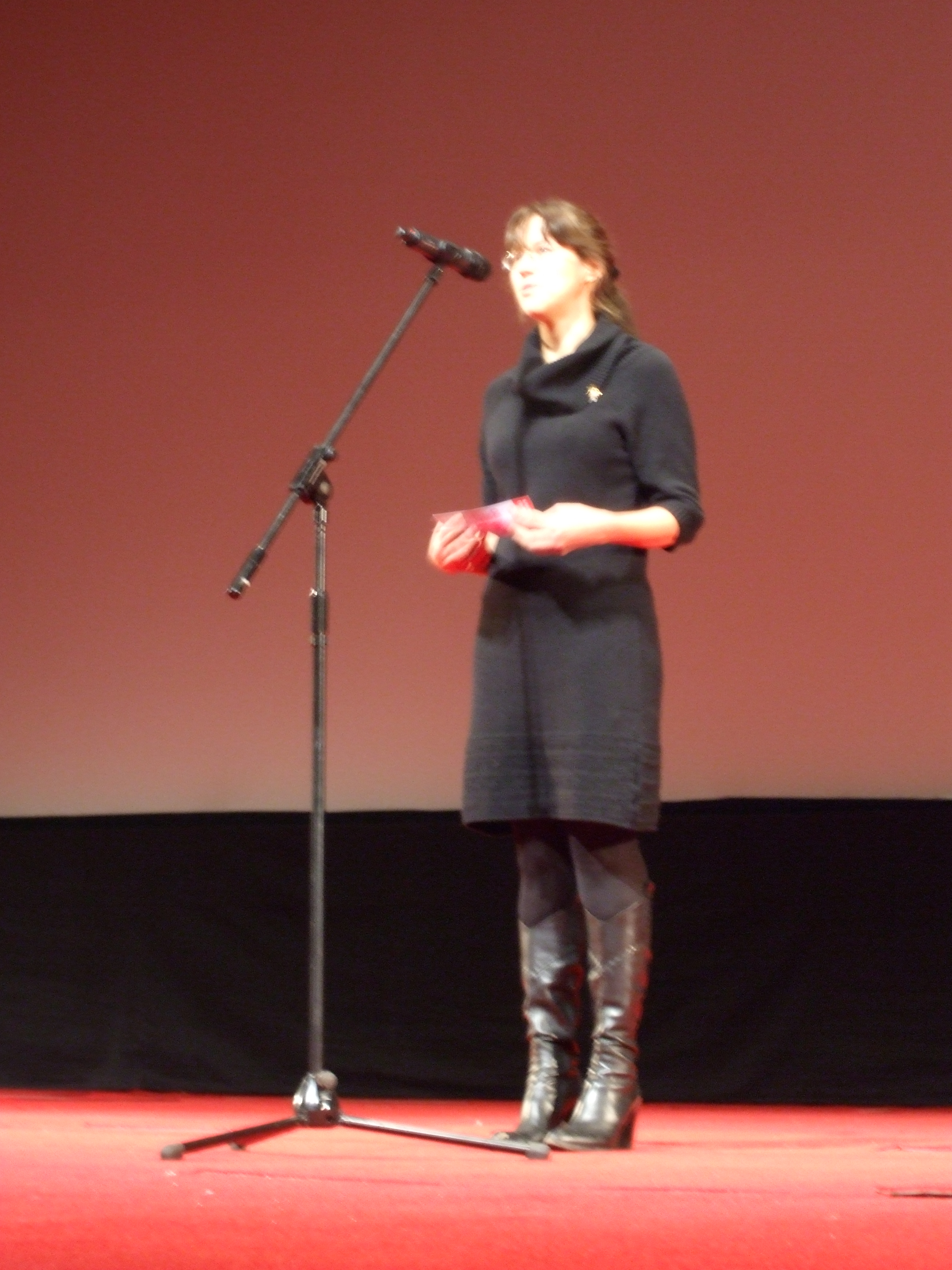 Премьера фильма "Я объявляю войну" в России, кинотеатр Октябрь на Новом Арбате. Вступительное слово перед показом. Екатерина Чистякова, директор фонда "Подари жизнь".